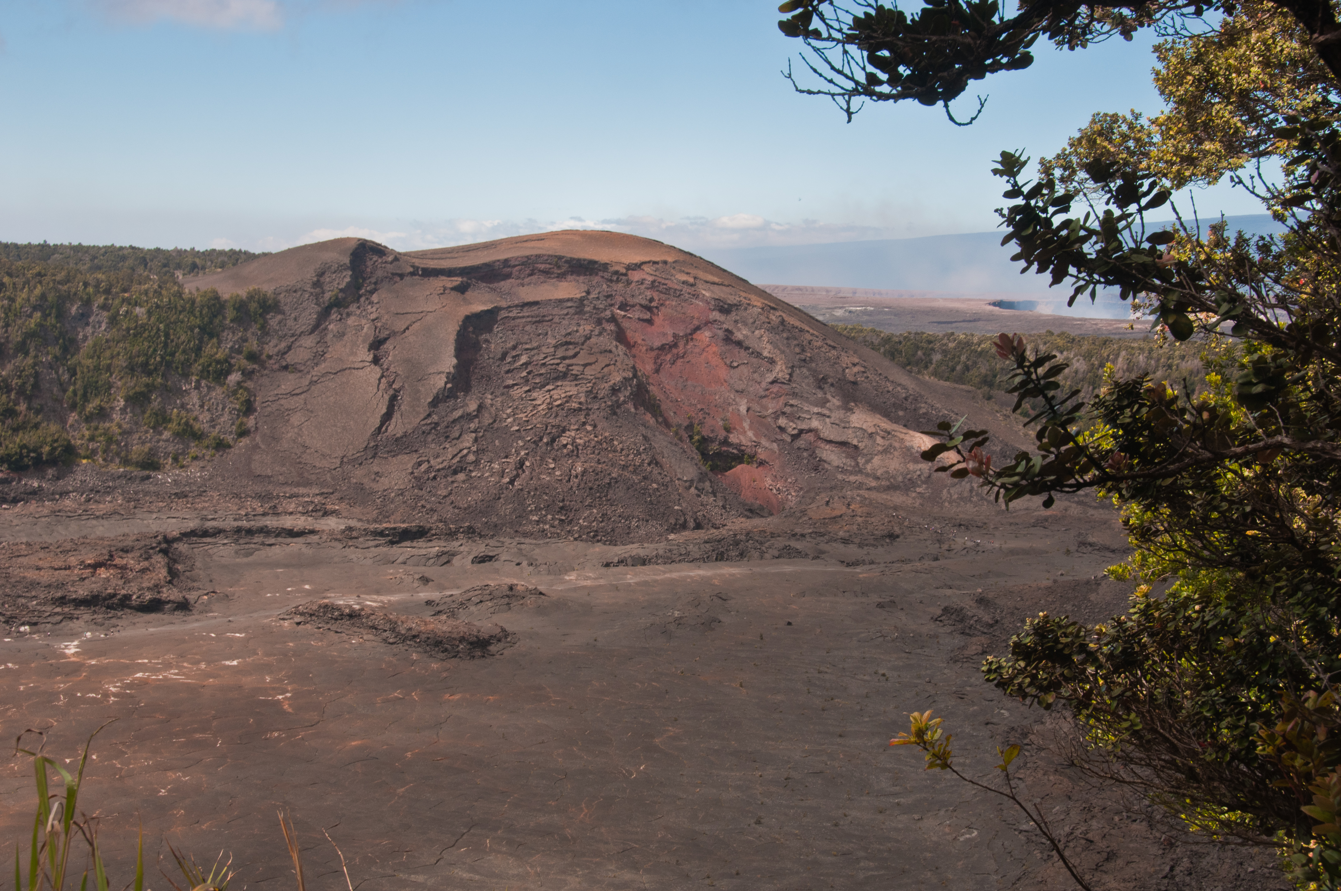 Kilauea Iki, Hawaii Volcanoes National Park